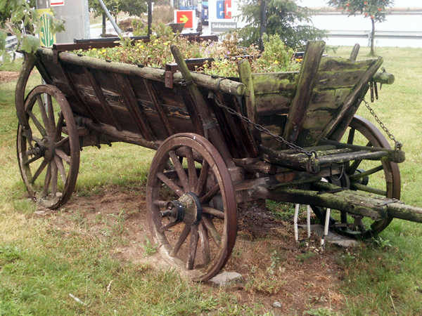 Nedersaksische boerenwagen, Emsland, Duitsland